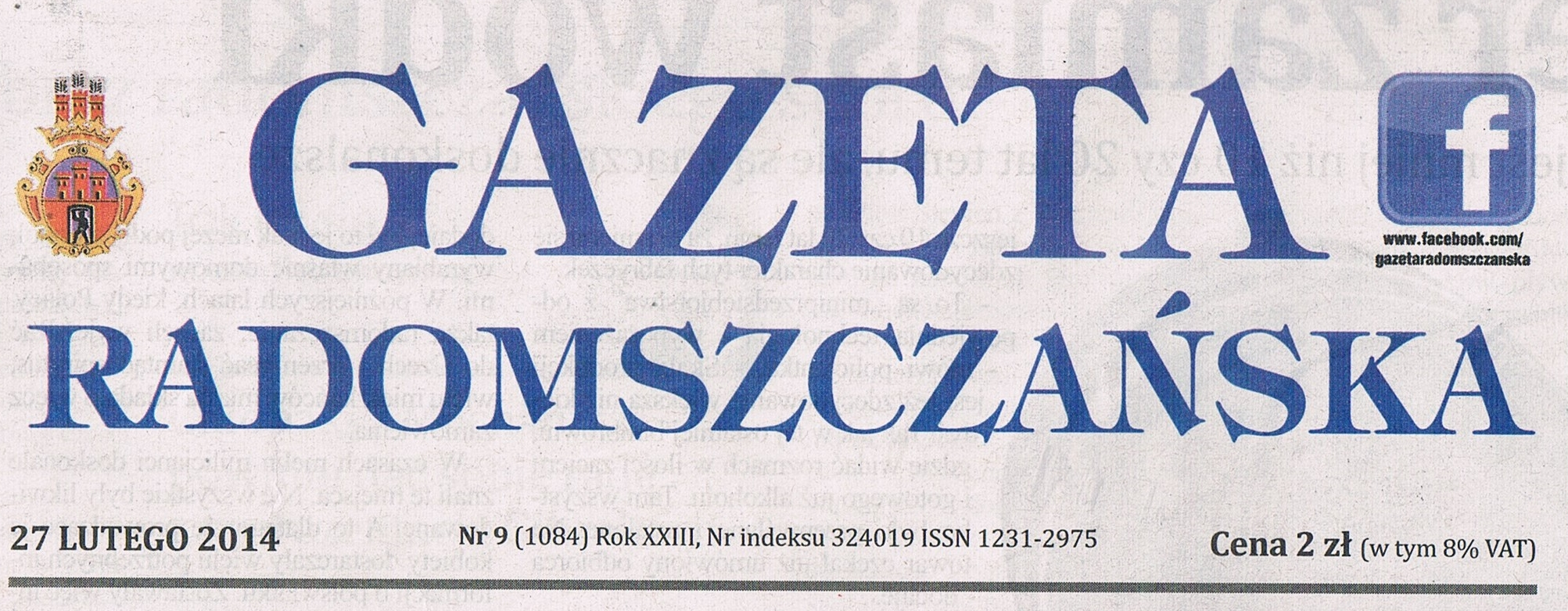 Gazeta Radomszczańska